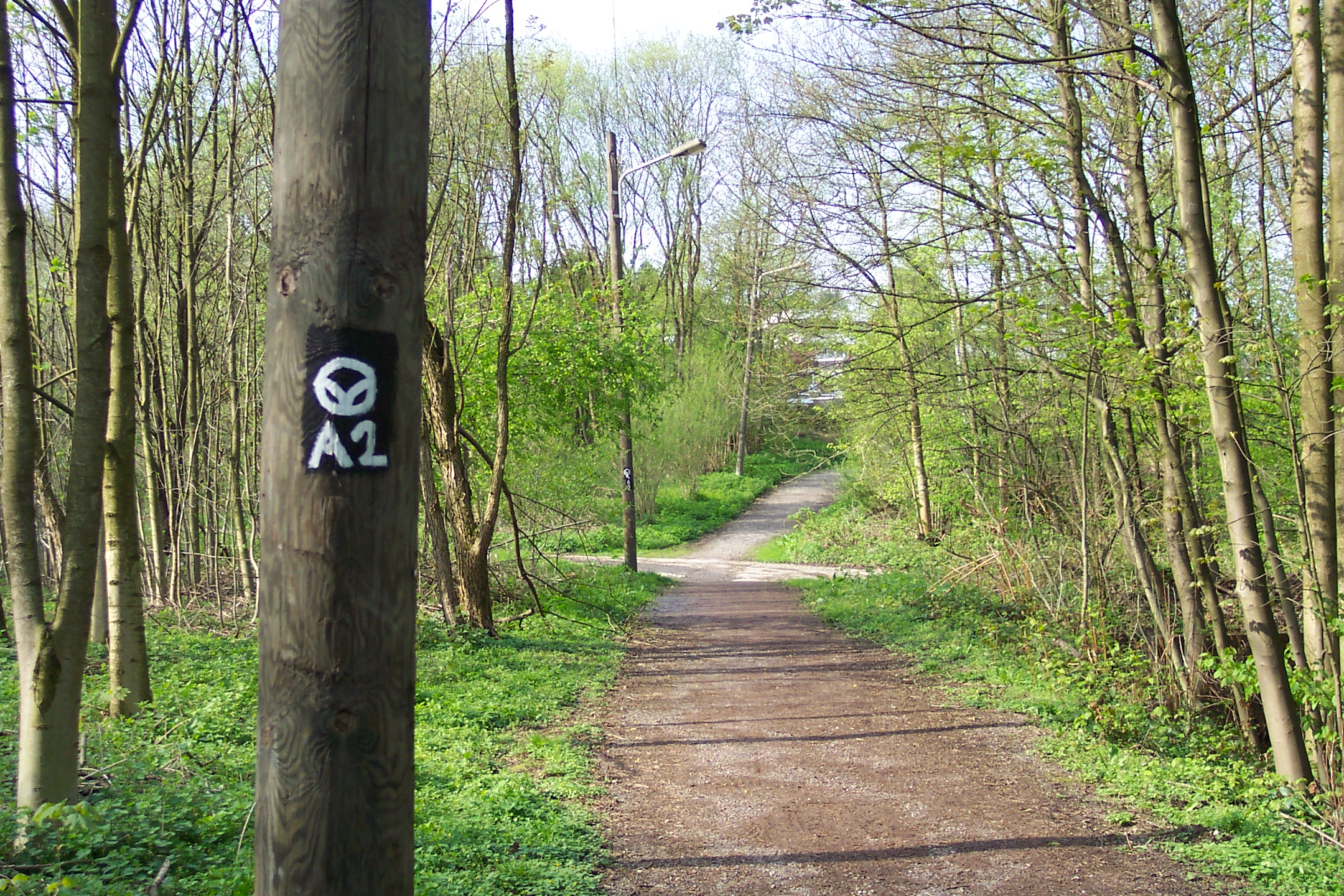 Der Eulenkopfweg, Wuppertal